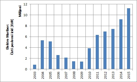 Čisti poslovni izid v obdobju od leta 2003 naprej.